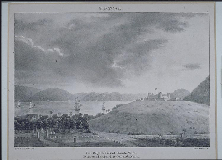 Fort Belgica at Bandanaira, Banda Islands